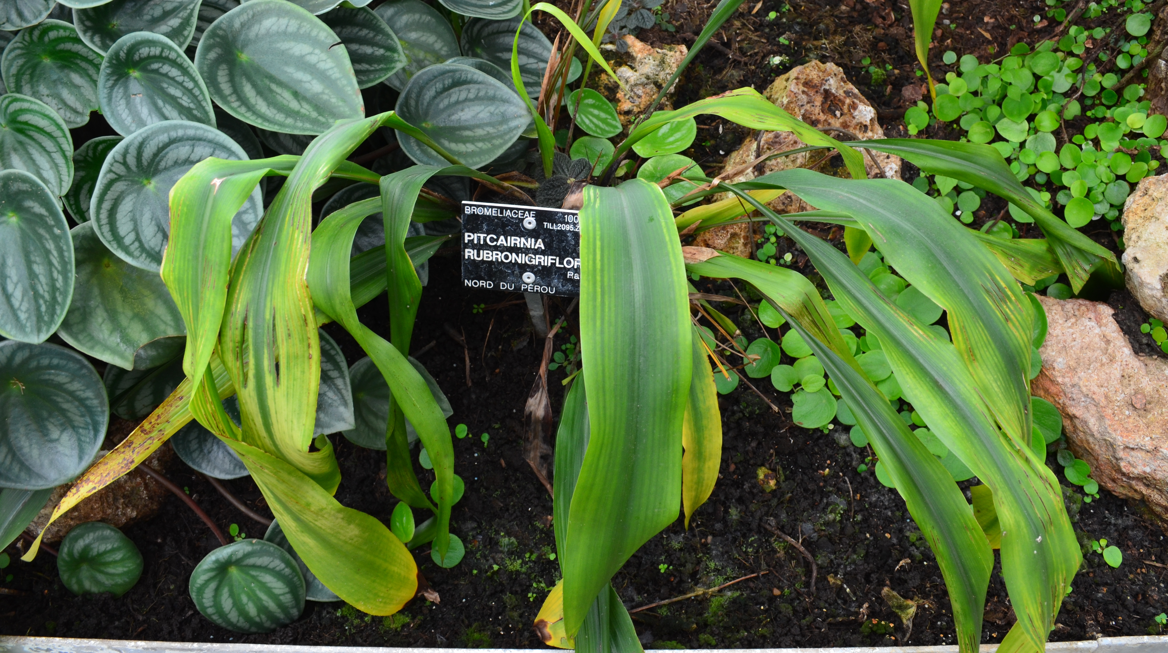 Spécimen de Pitcairnia rubronigriflora, espèce de Bromeliaceae dans les serres du jardin botanique de Lyon (France), au parc de la Tête-d'Or